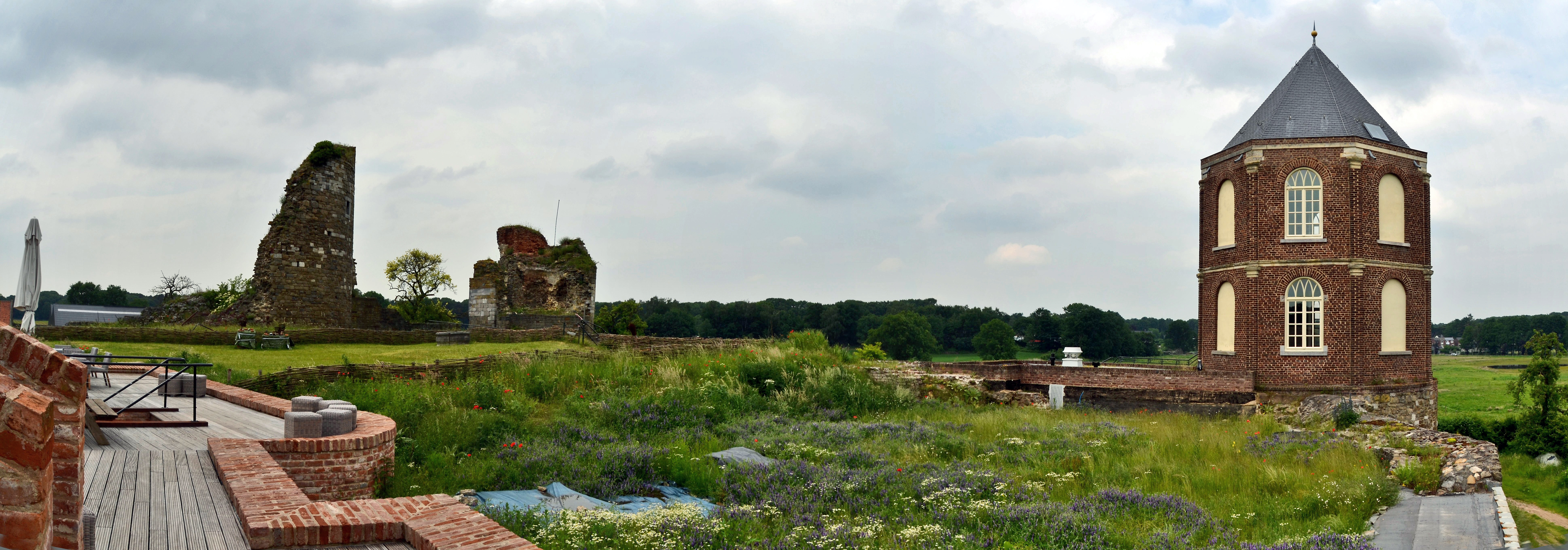 Uitzicht vanaaf de gerestaureed zuid-oost toren ( mei 2018)